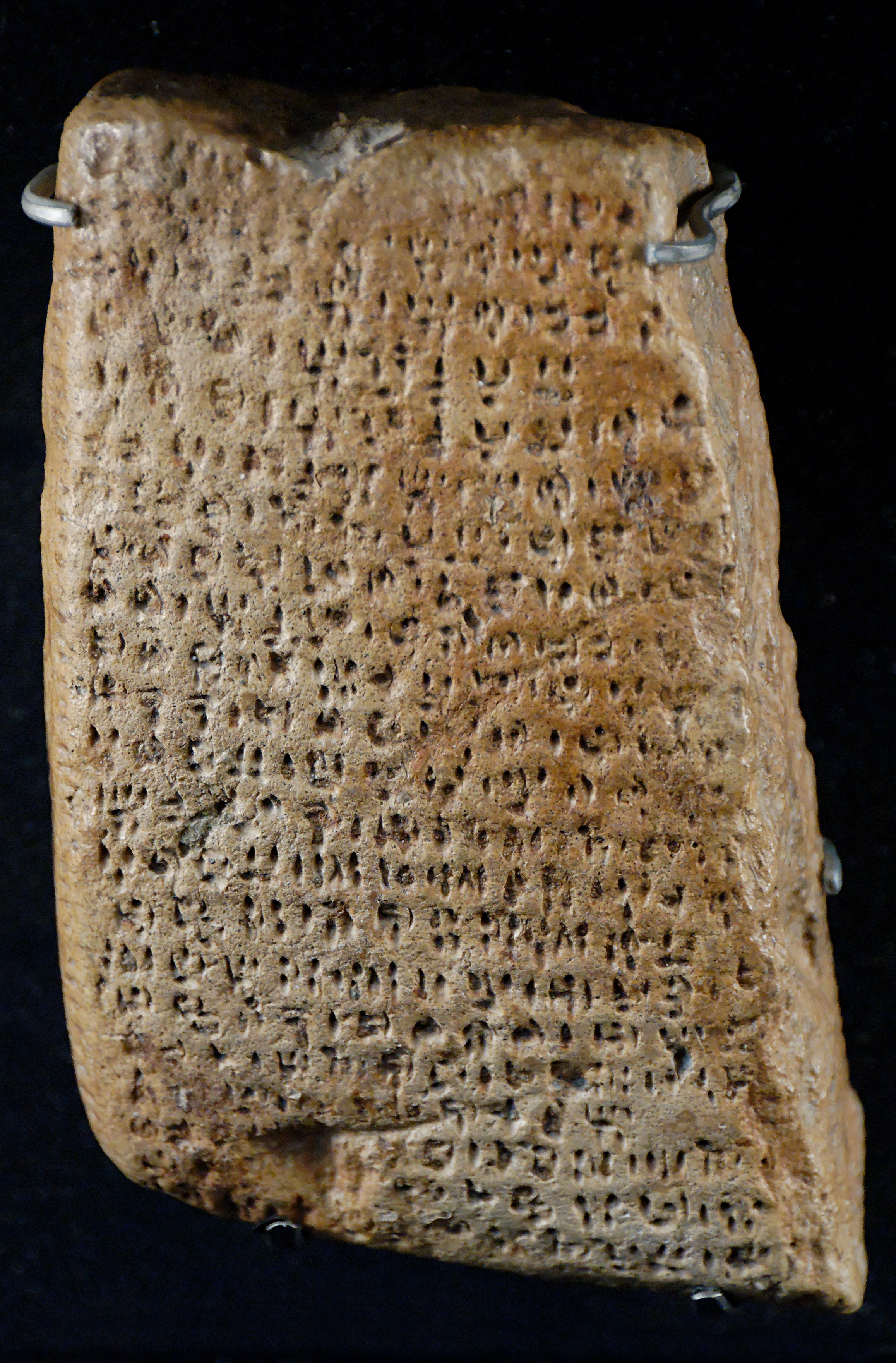 Provenance: Enkomi, Cyprus